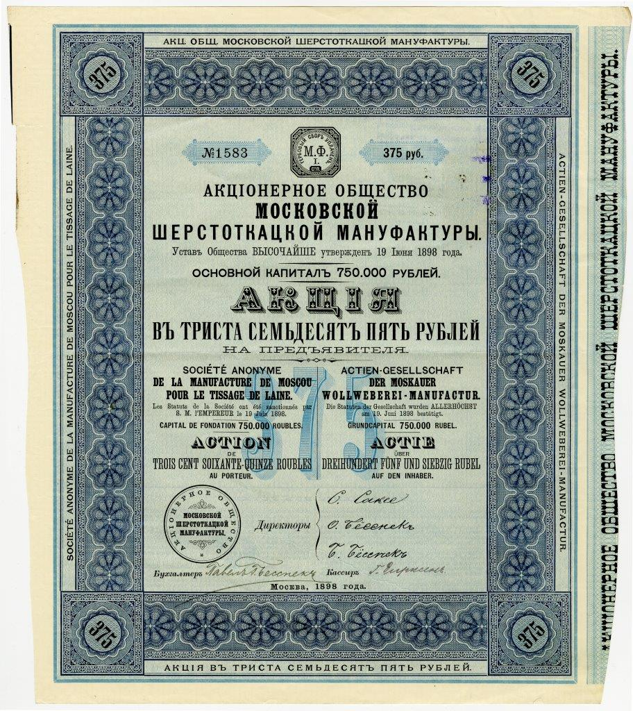 Акция в 375 руб. на предъявителя Акционерного общества Московской шерстоткацкой мануфактуры. Москва, 1898 г.